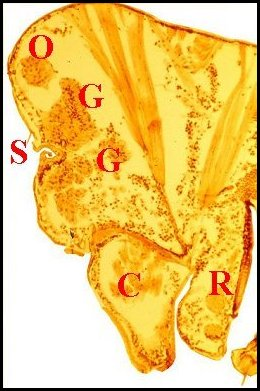 Coupe sagittale du prosoma d' Argyrodes caudatus montrant la glande clypéale.